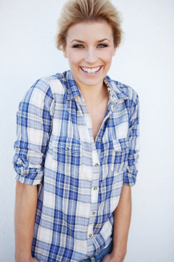 Annica Hansen Moderatorin ProSieben Sport1